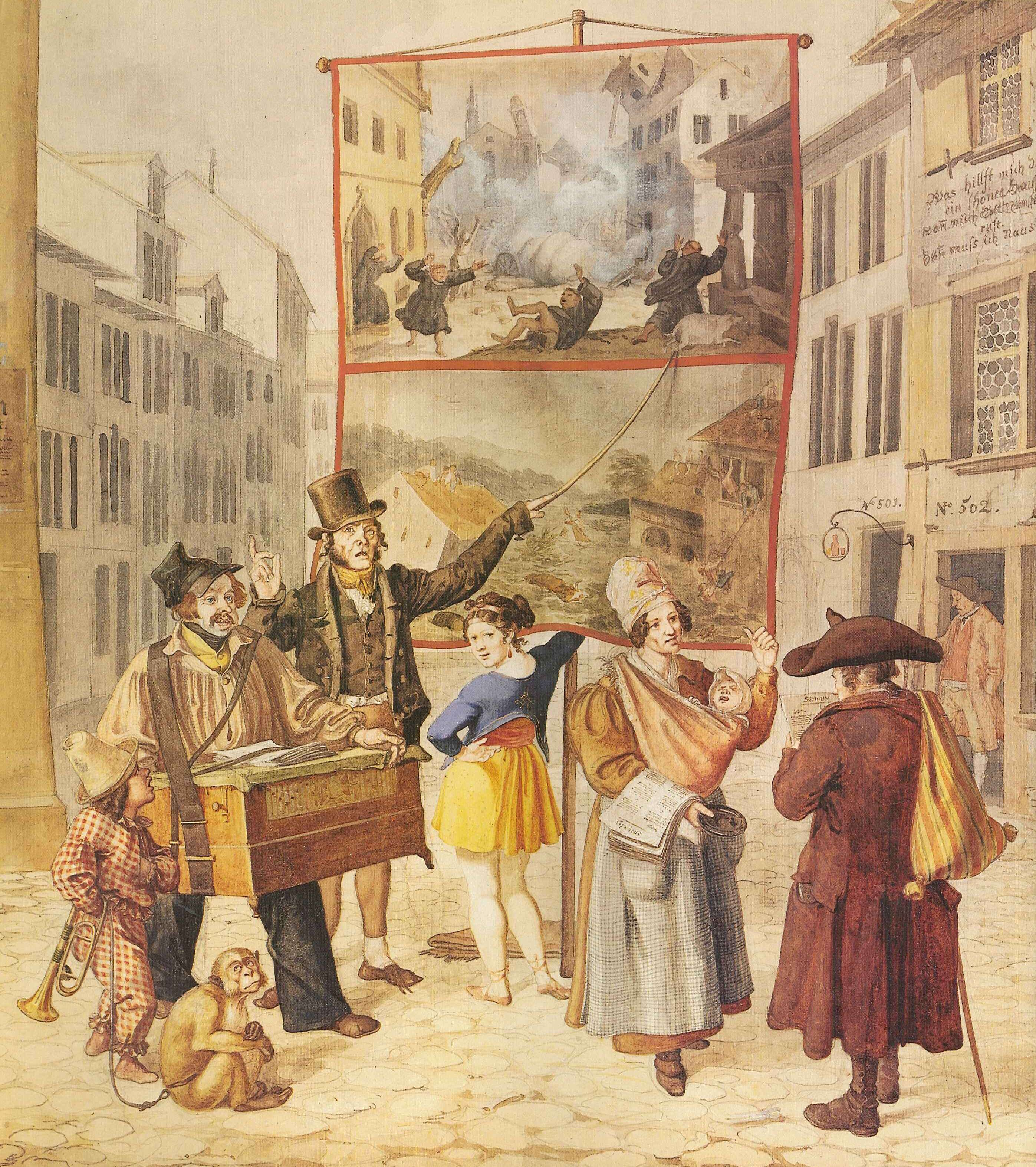 Bänkelsänger in Basel, vor dem «Wirtshaus zur Henne» am Nadelberg. Die besungenen Bilder zeigen das Erdbeben von Basel 1356 und die Überschwemmungen in Hölstein 1830.